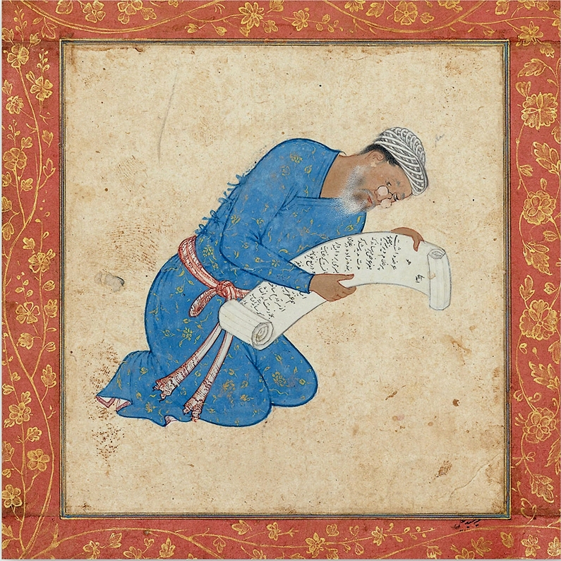 Мир Сеид Али. Портрет Мир Мусаввира 1565-70, Musee Guimet, Paris